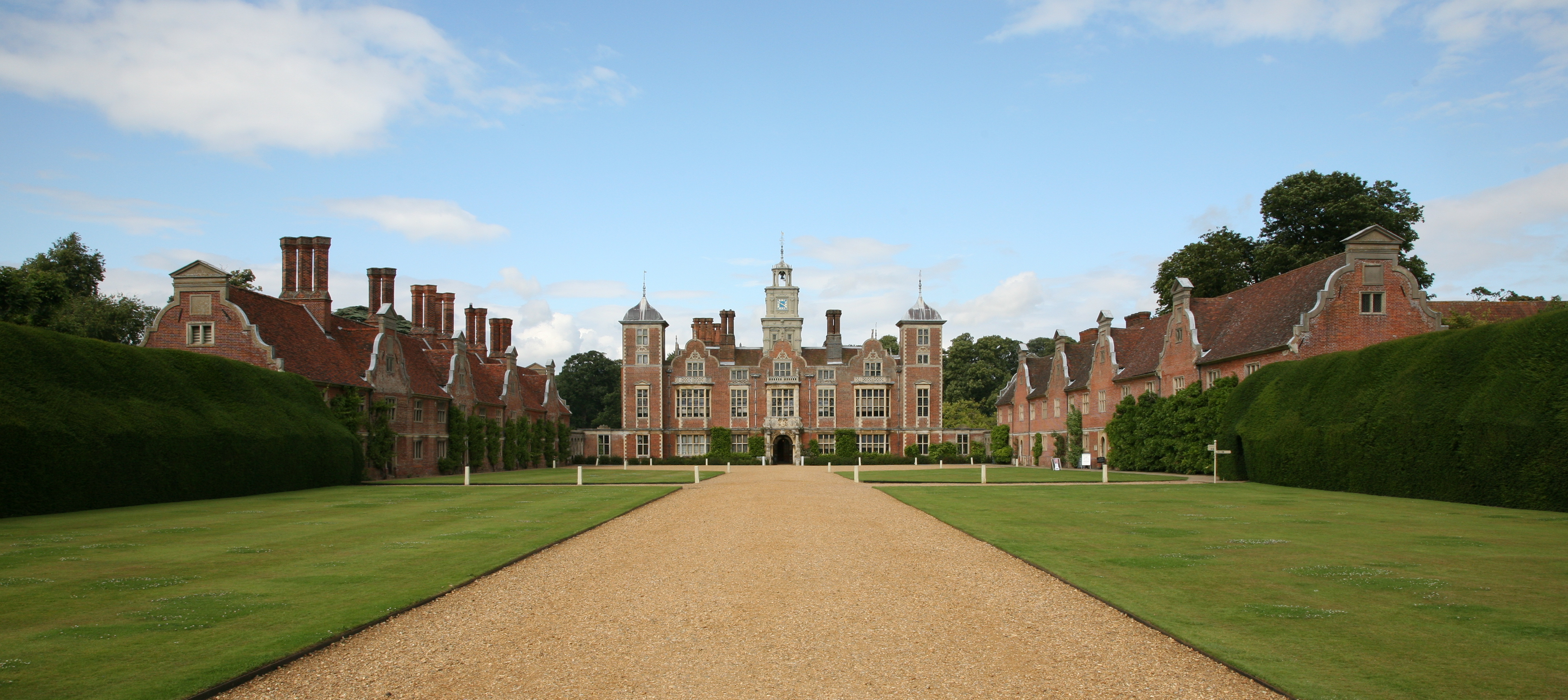 Blickling Hall in Norfolk